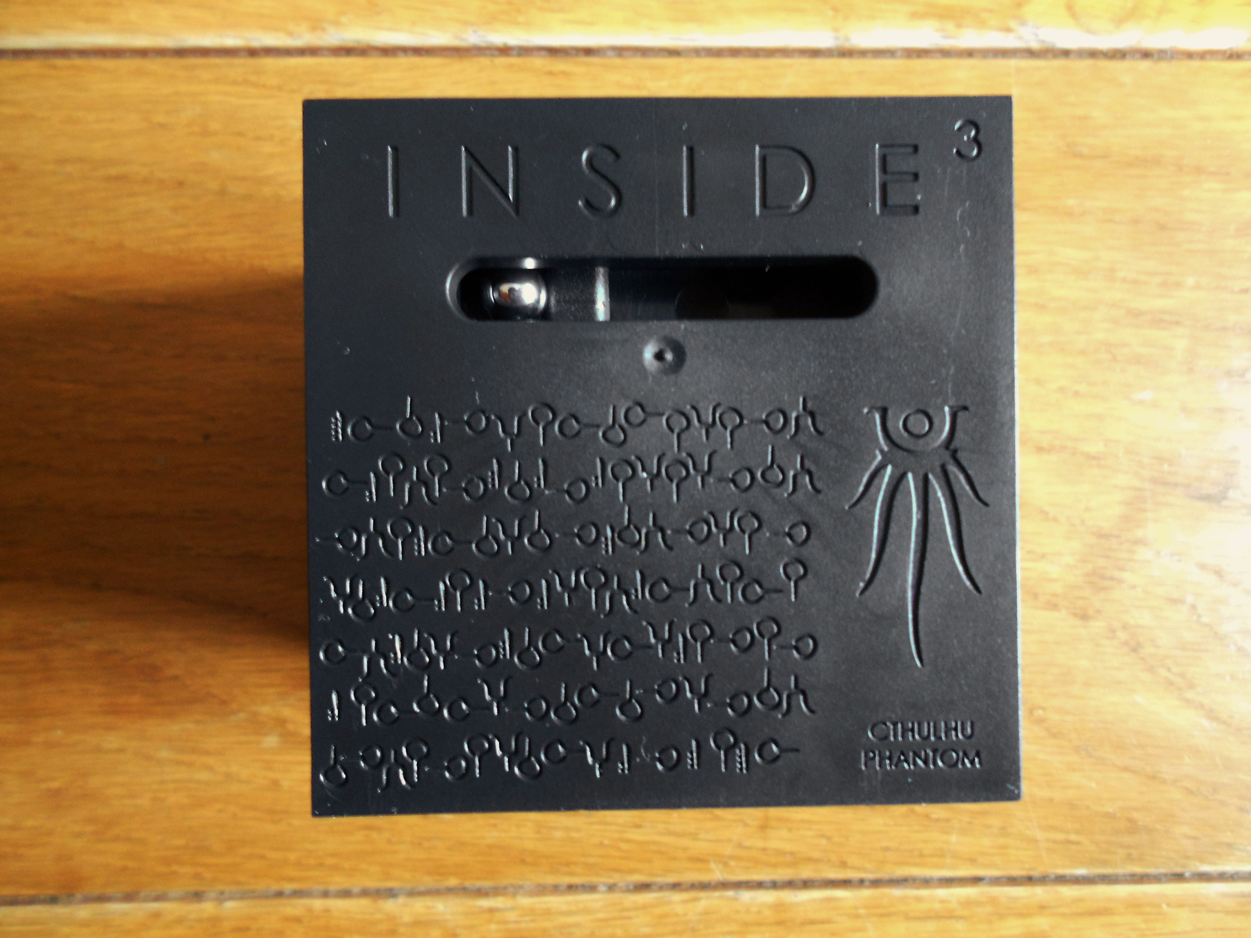 Cthulhu Phantom, cube du jeu Insidezecube, l'un des cubes les plus difficiles, le plan est codé et le cube scellé